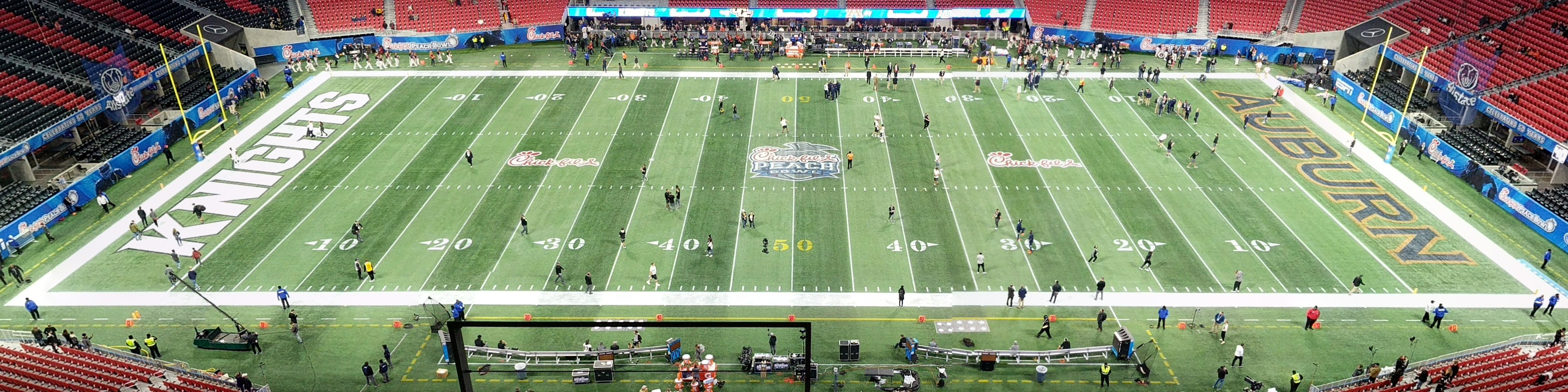 200 level